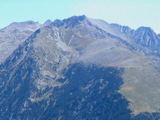 Vall de Comaltes vista des de l'Aüt; la Vall de Boí, Alta Ribagorça, Catalunya